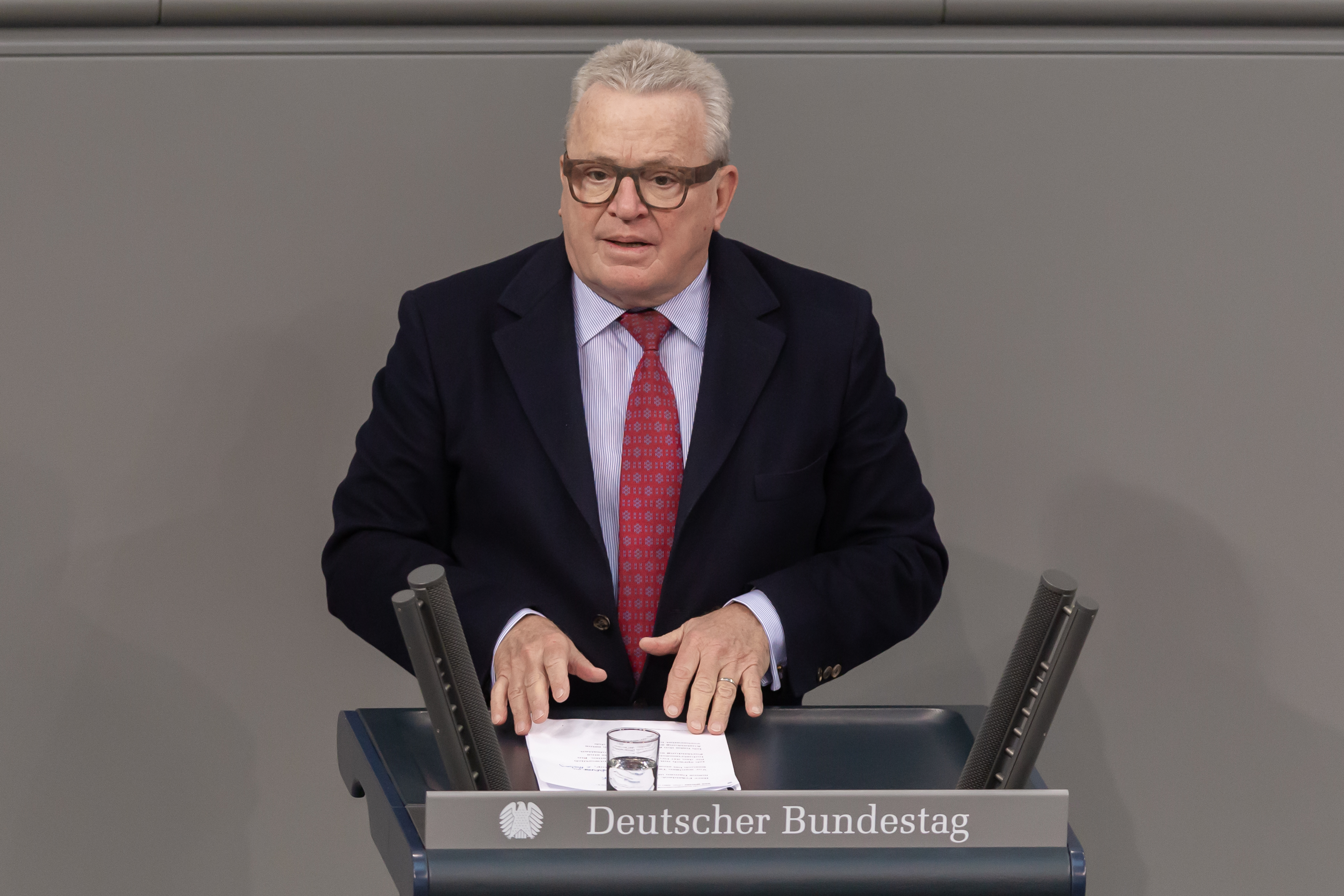 Deutscher Bundestag; Thomas Sattelberger, FDP, spricht im Plenum